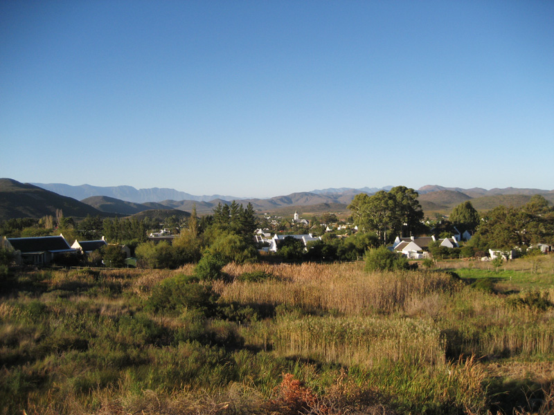 McGregor